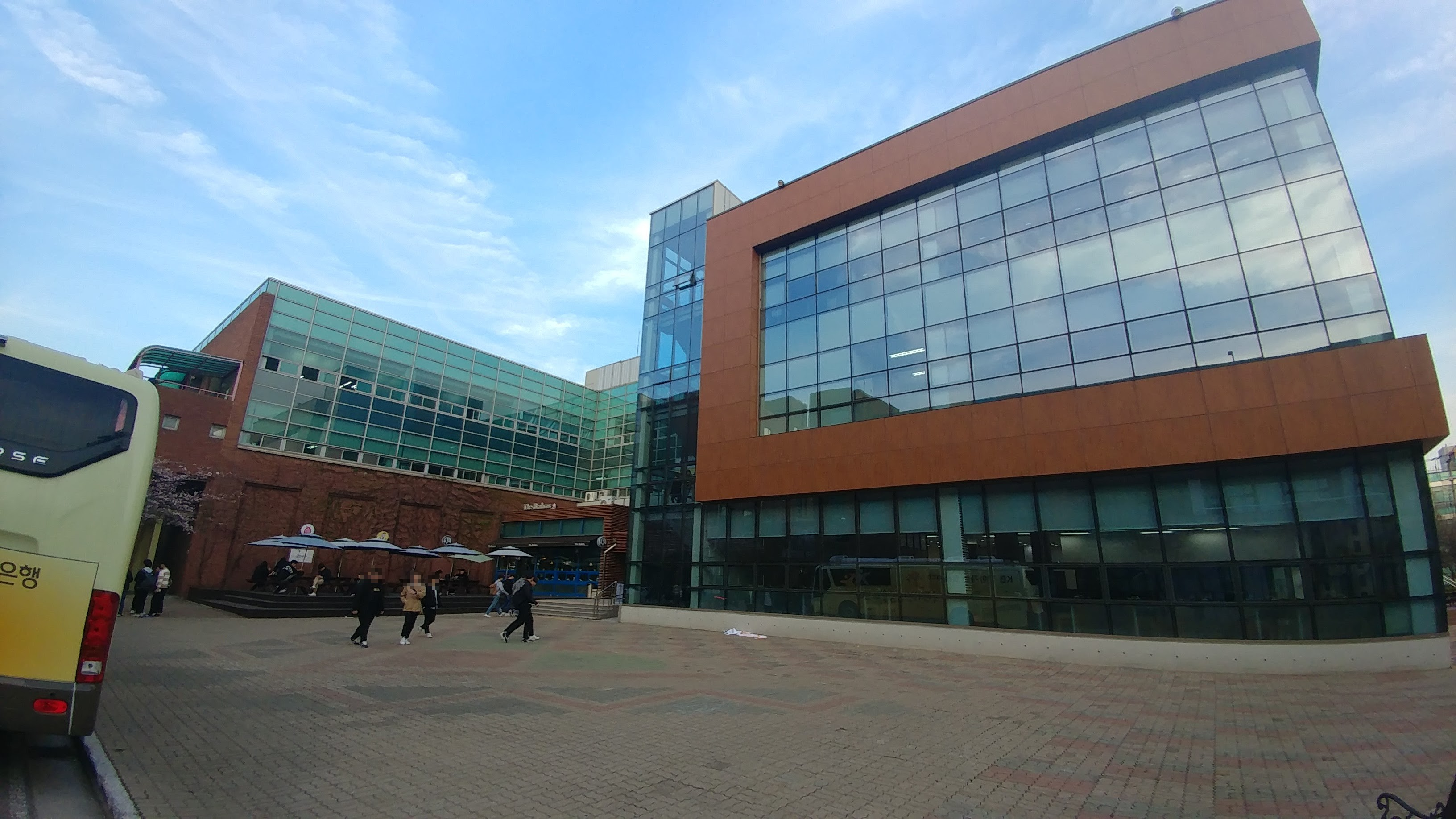 경기과학기술대학교 학생회관